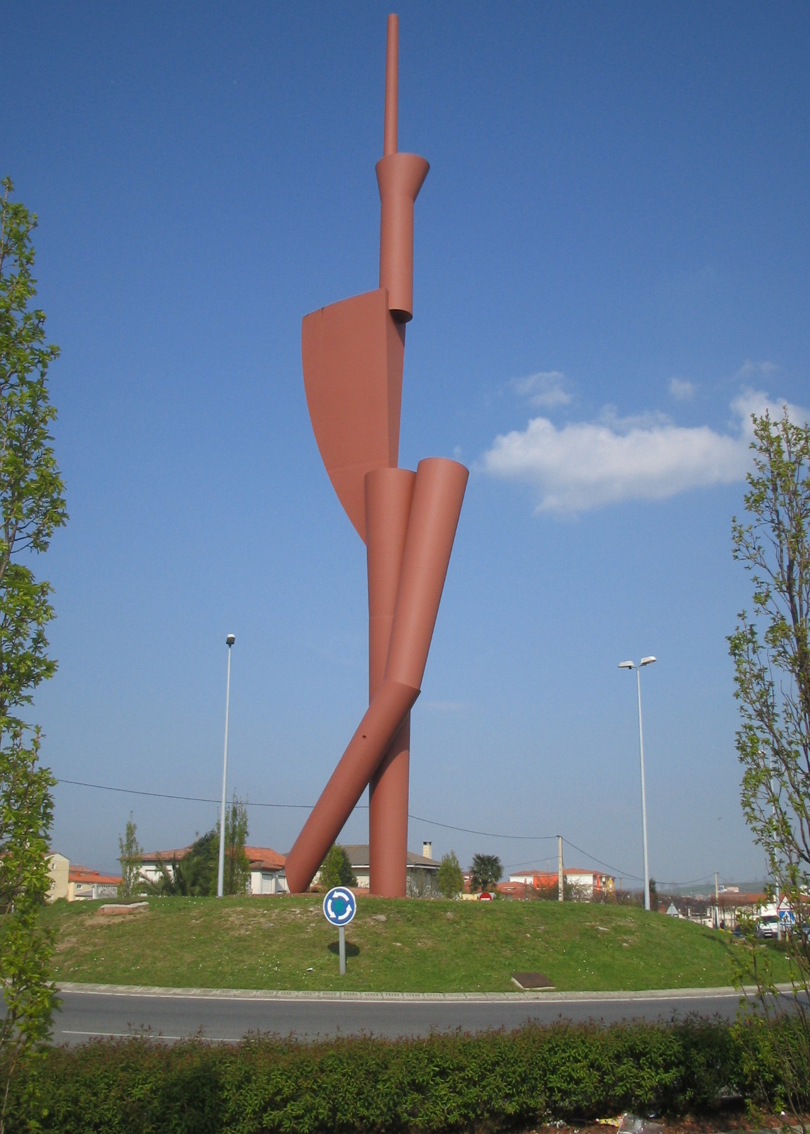 Rotonda de Torrelavega. Tiene la escultura "Oteando", del artista valenciano Miquel Navarro. Alcanza los 25 metros de altura.